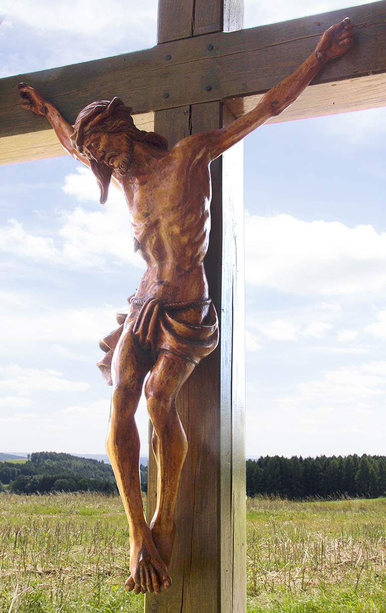 Korpus am Feldkreuz wenige Meter links (östlich) neben der Sebastian-Kapelle zu Kupferberg